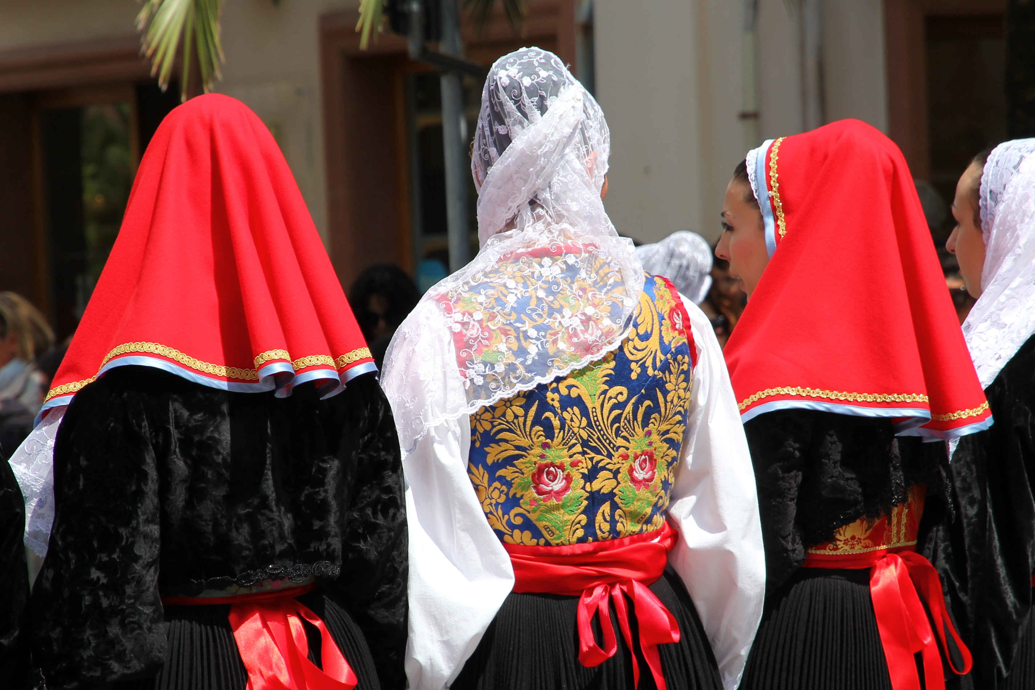 Costume tradizionale